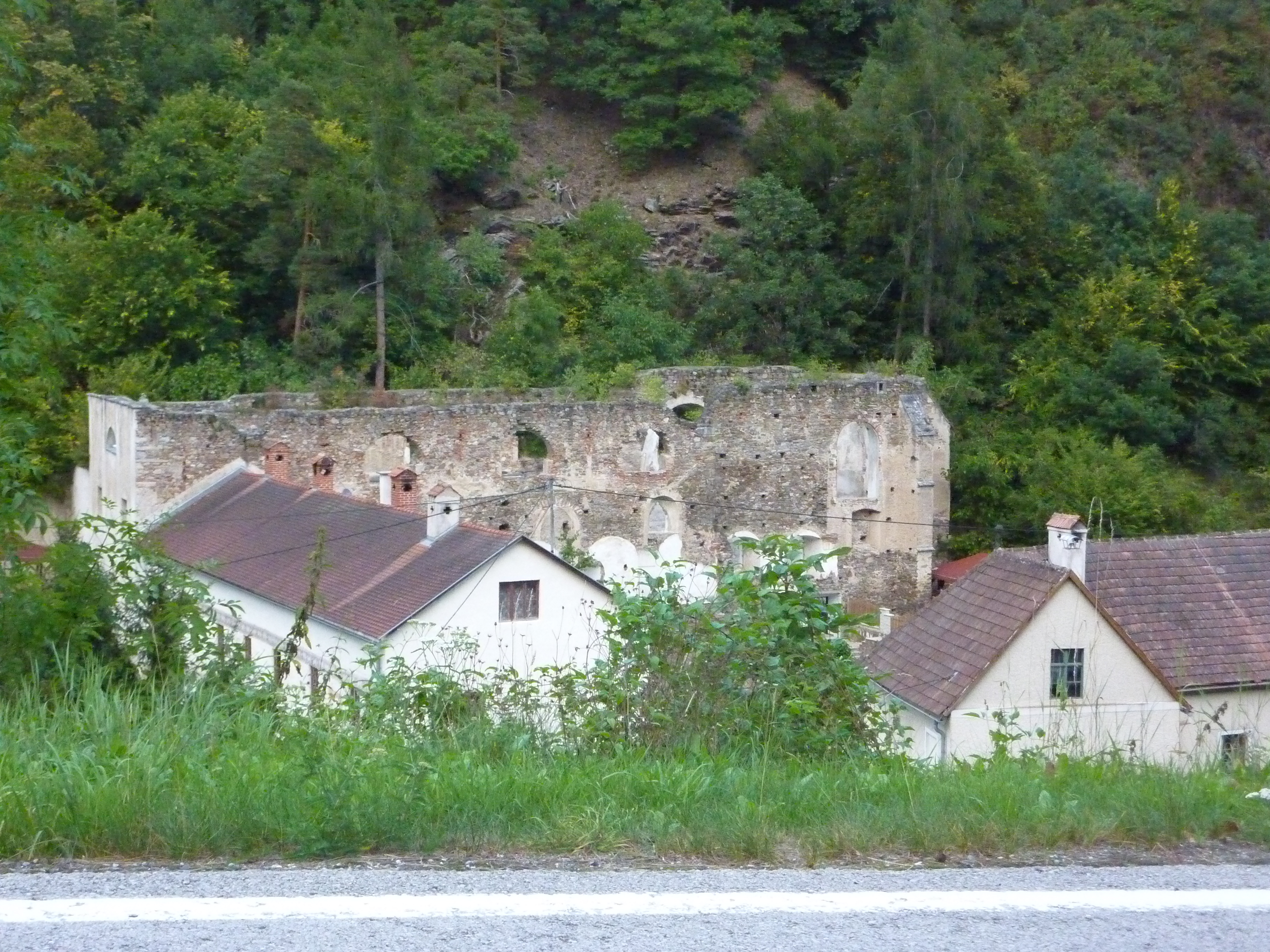 Ruine von Kirche und Paulinerkloster in Unterranna, Mühldorf, Niederösterreich